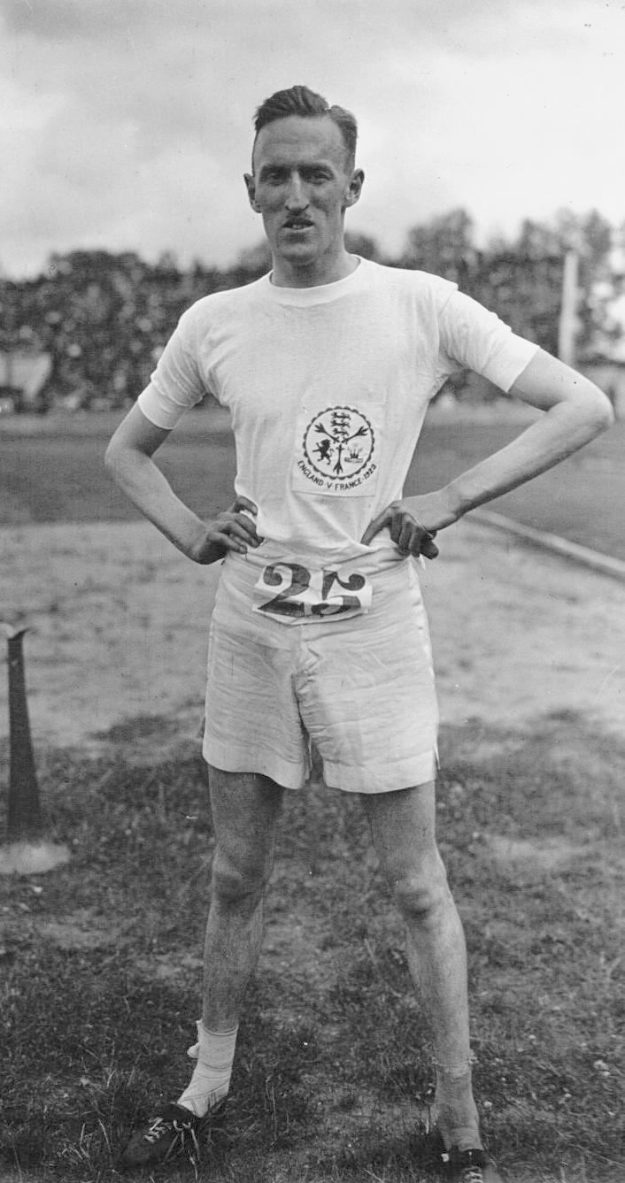 Stade Pershing, match athlétisme France-Angleterre : Stallard, gagnant du 1500 m : [photographie de presse] / Agence Meurisse